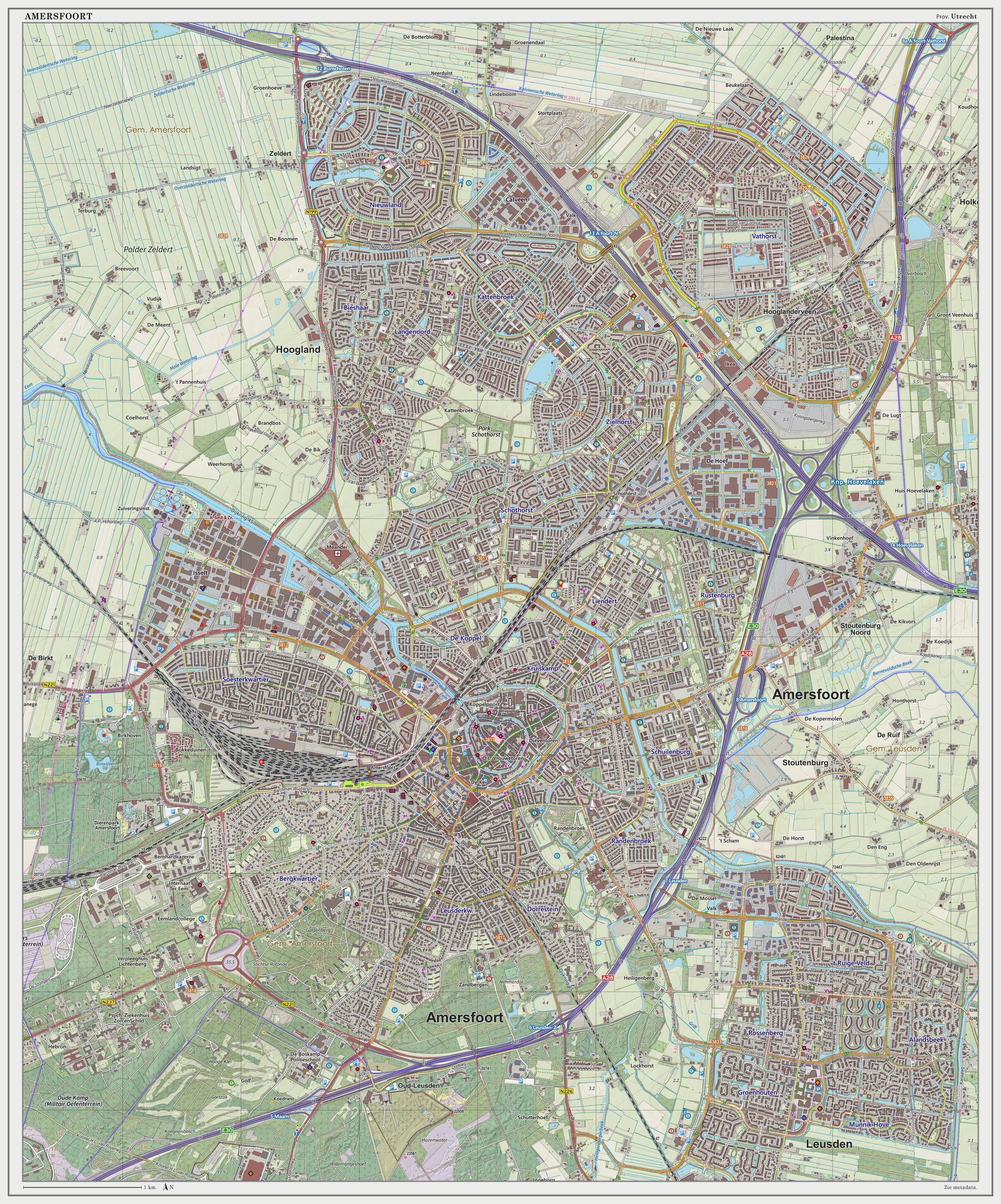 Topografische kaart van Amersfoort (woonplaats). Resolutie: 300 pixels/km. Kaartbeeld samengesteld uit de open geodata van de Top10NL en Top25namen (Basisregistratie Topografie, Kadaster), Creative Commons BY licentie. Gebouwvlakken uit open geodata BAG extract. Wegen uit de OpenStreetMap, OpenStreetMap community. Reliëfschaduw uit de Actuele Hoogtekaart AHN2. Samenstelling en kleurenschema: Jan-Willem van Aalst, met QGIS2. Zie ook de Legenda.